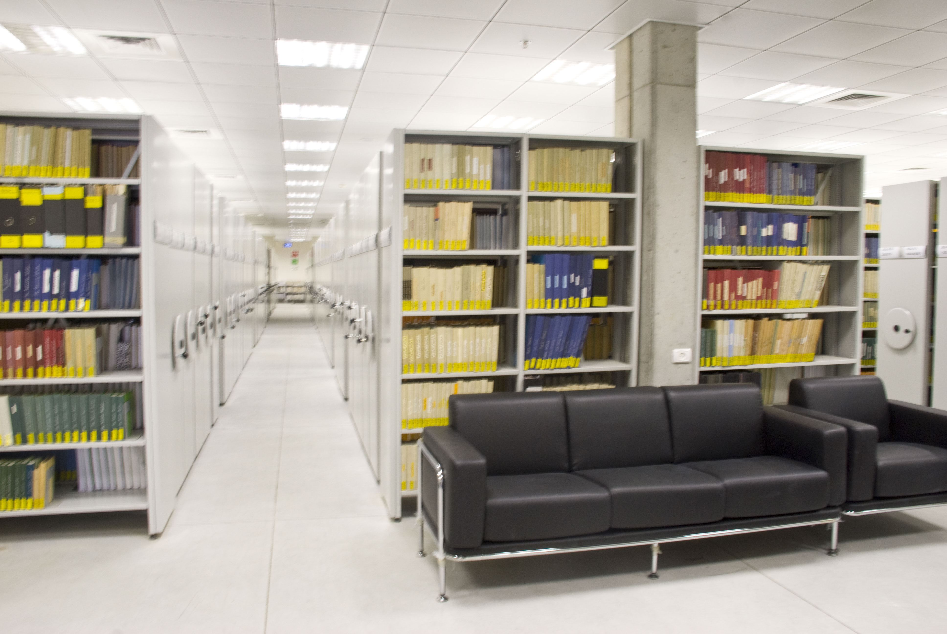 אוסף כתבי-העת הלועזי באגף החדש של הספרייה